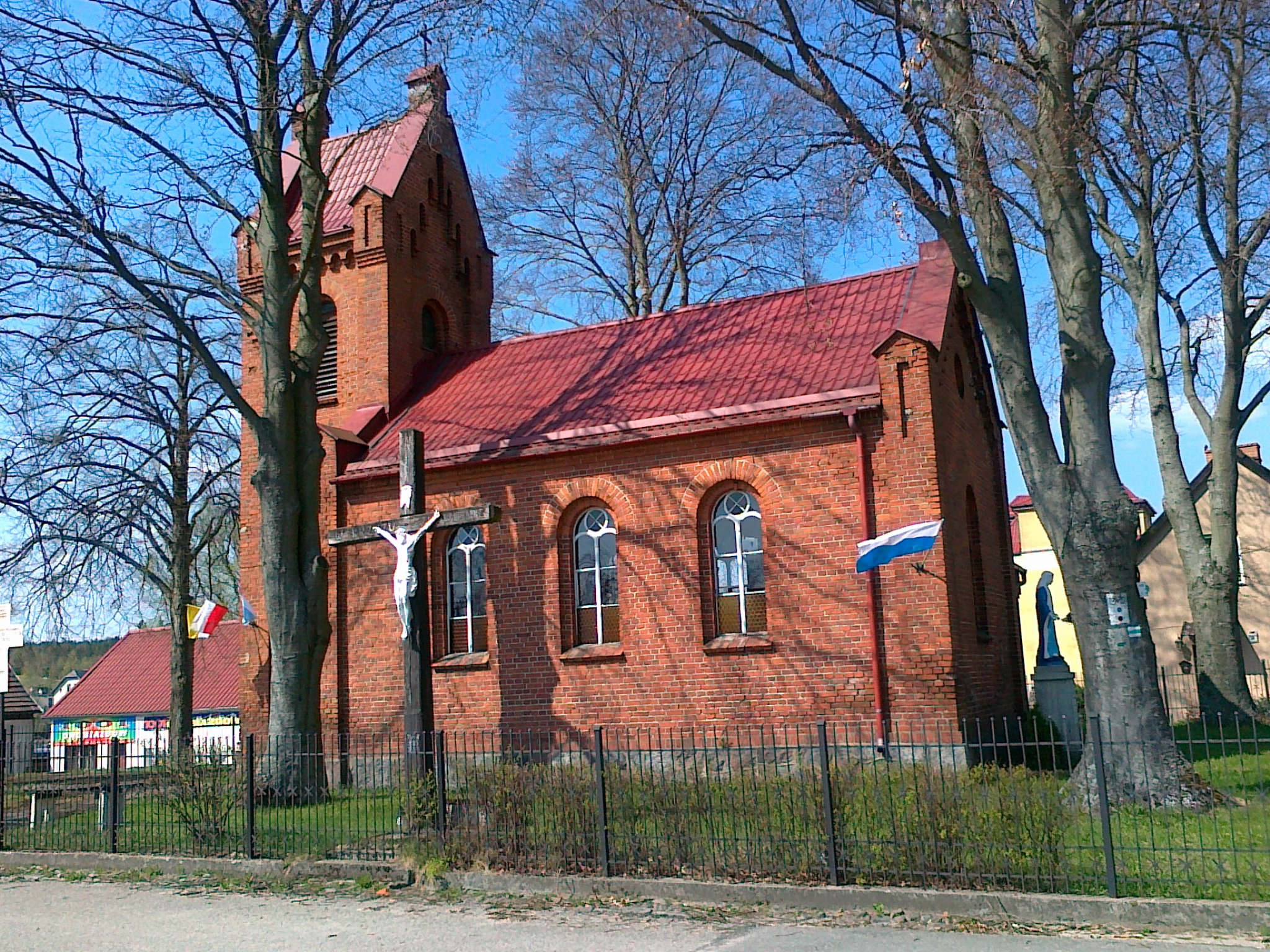 Kościółek centrum miasteczka